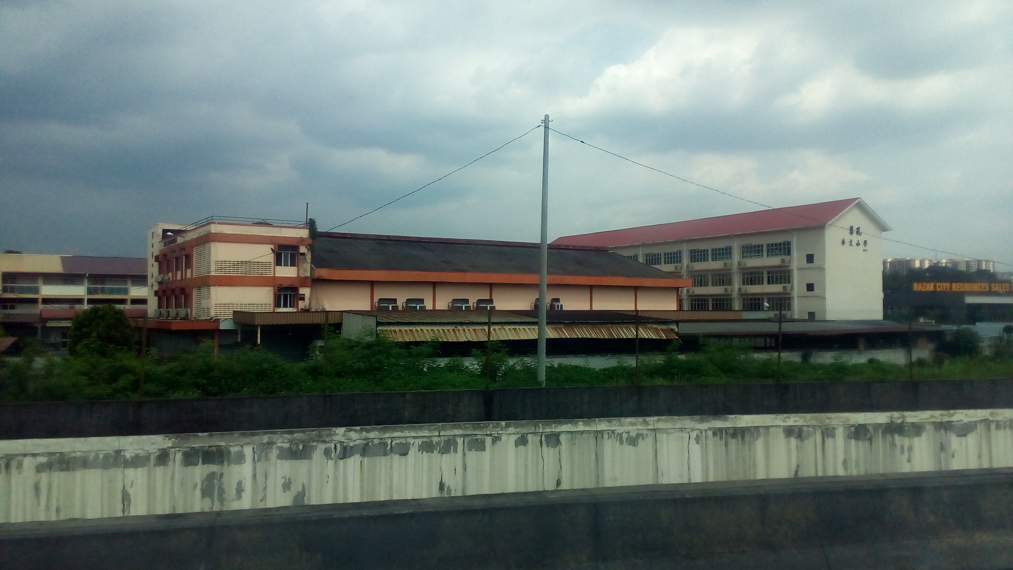 尊孔华文小学